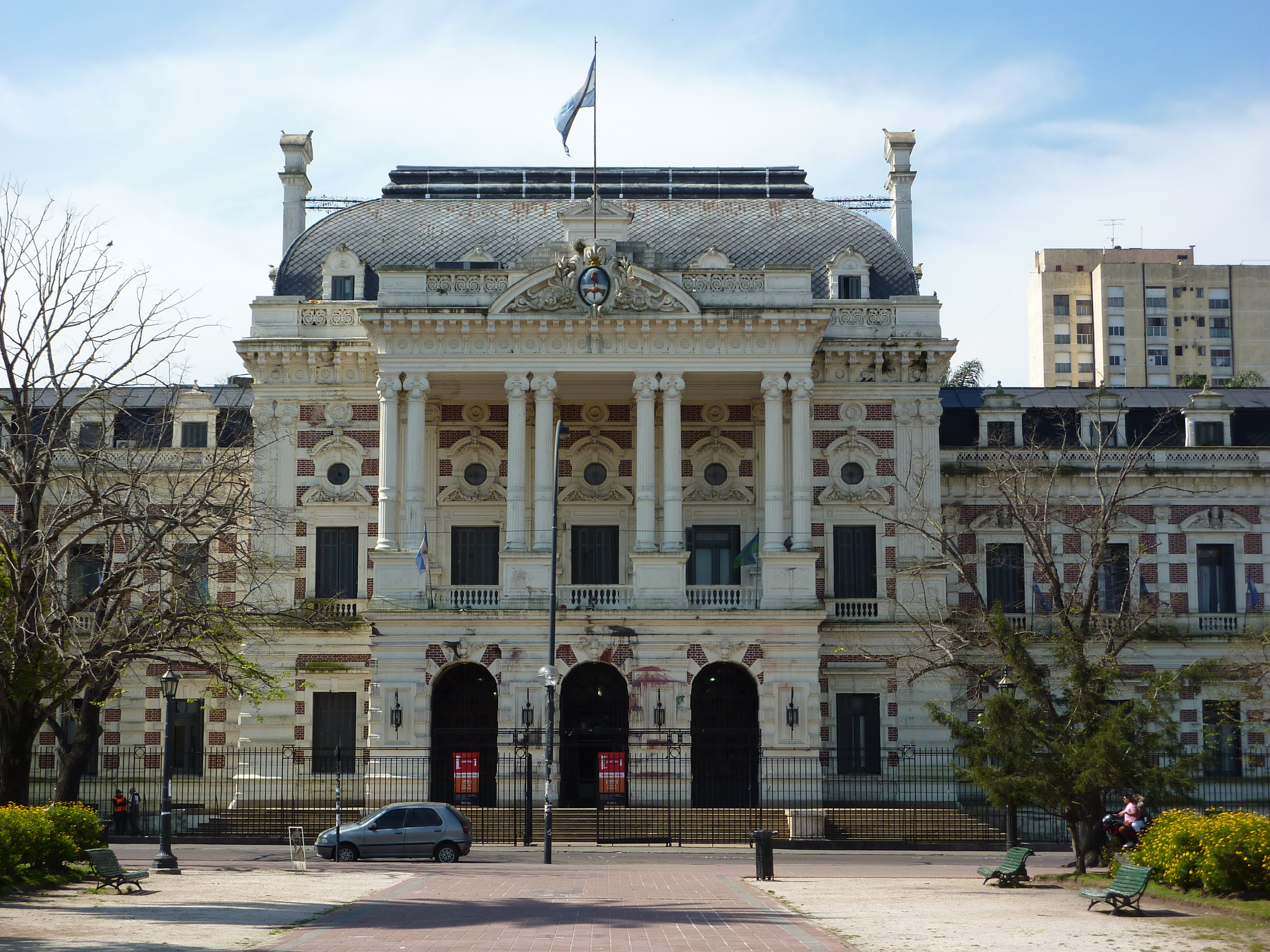 Casa de Gobierno de Buenos Aires y Residencia del Gobernador